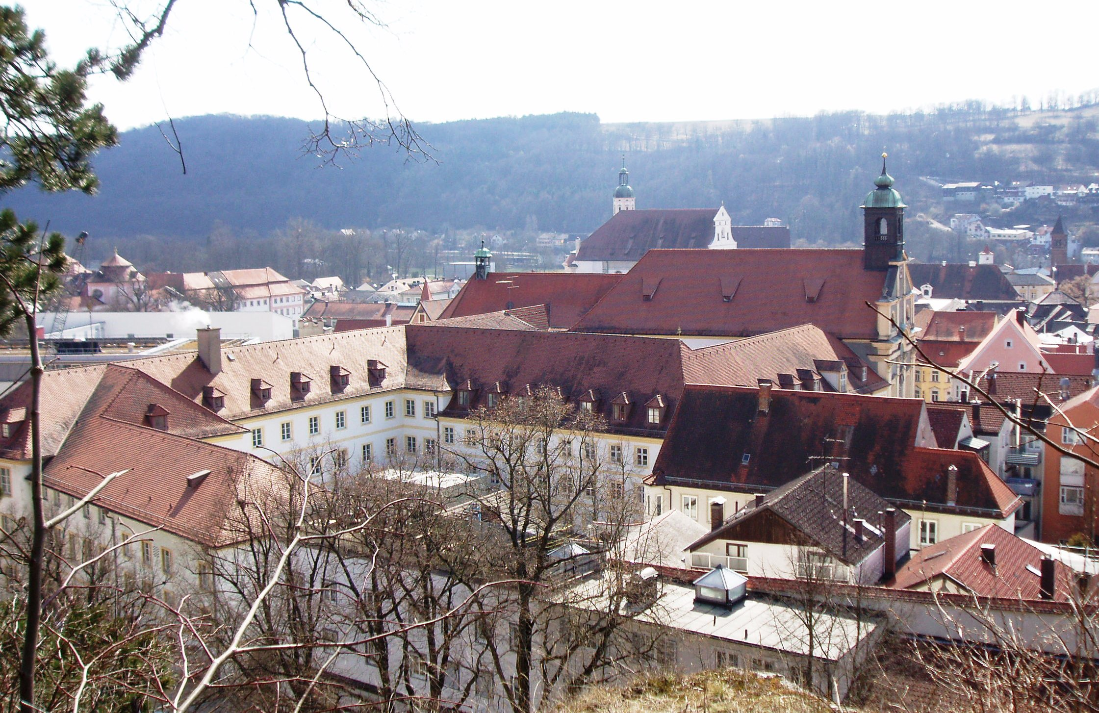 Ehemaliges_Dominikanerkloster_Eichstätt,_heute_Gabrieli-Gymnasium